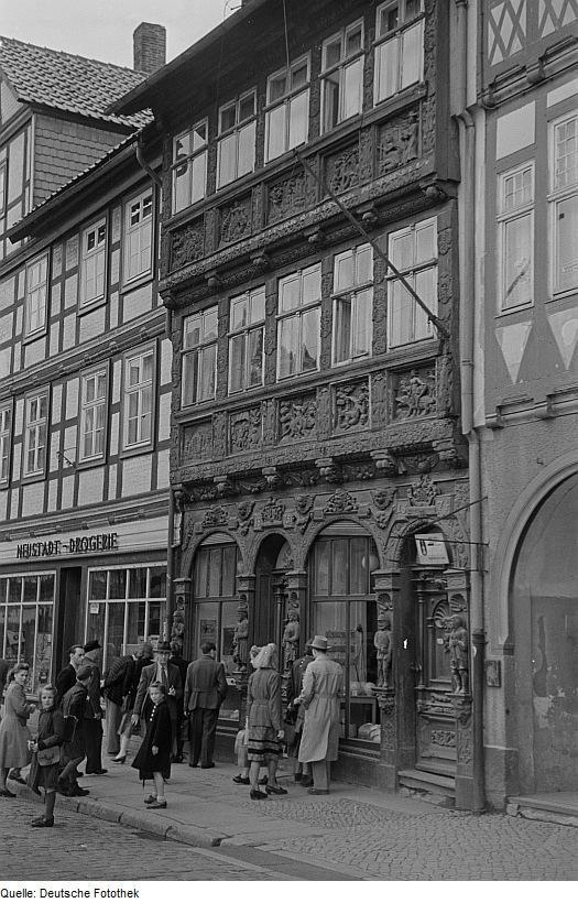 Original image description from the Deutsche Fotothek Ansicht Krummelsches Haus in der Breiten Straße